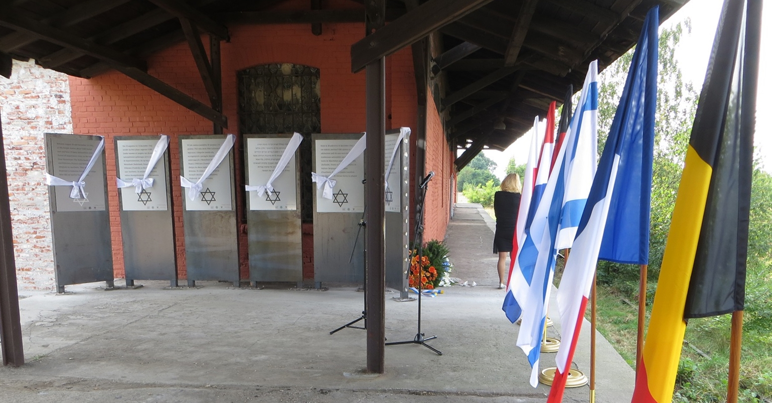 Odsłonięcie tablic na stacji w Koźlu (wrzesień 2016). Tablice upamiętniają transporty Żydów zachodnioeuropejskich do obozu w Oświęcimiu (jesień 1942 r.), w tym osoby które w wyniku selekcji w Koźlu trafiły do obozów pracy Organizacji Schmelt.